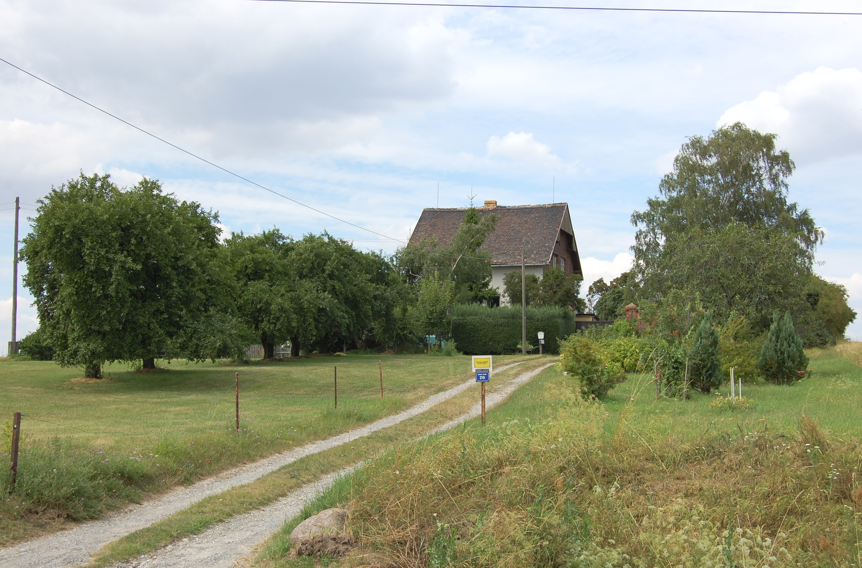 Wohnhaus nördlich der Sohlener Straße, kurz nach der Ortsausfahrt Sohlen, ursprünglich Standort einer zu Westerhüsen gehörenden Ziegelei